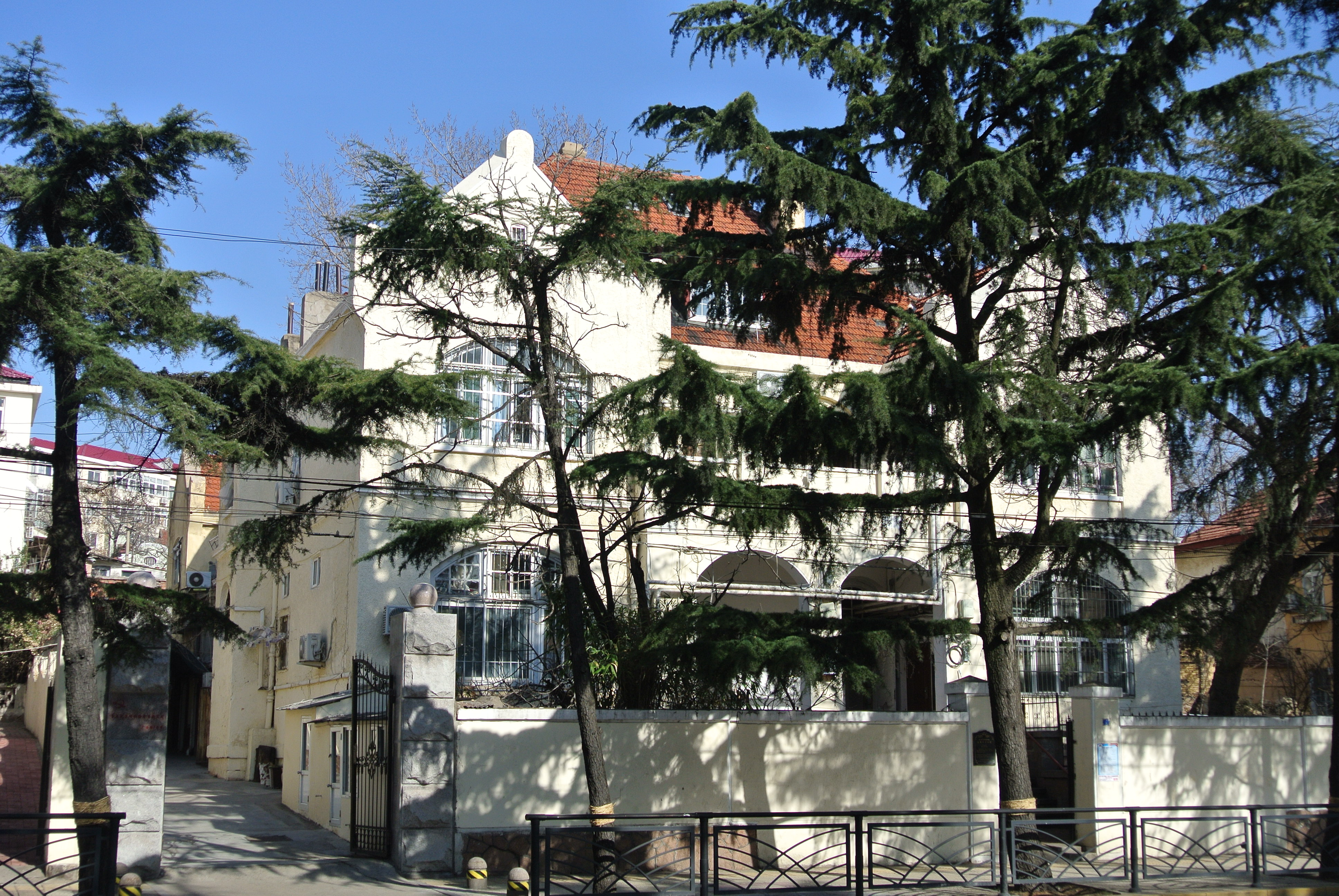 青岛广西路5号